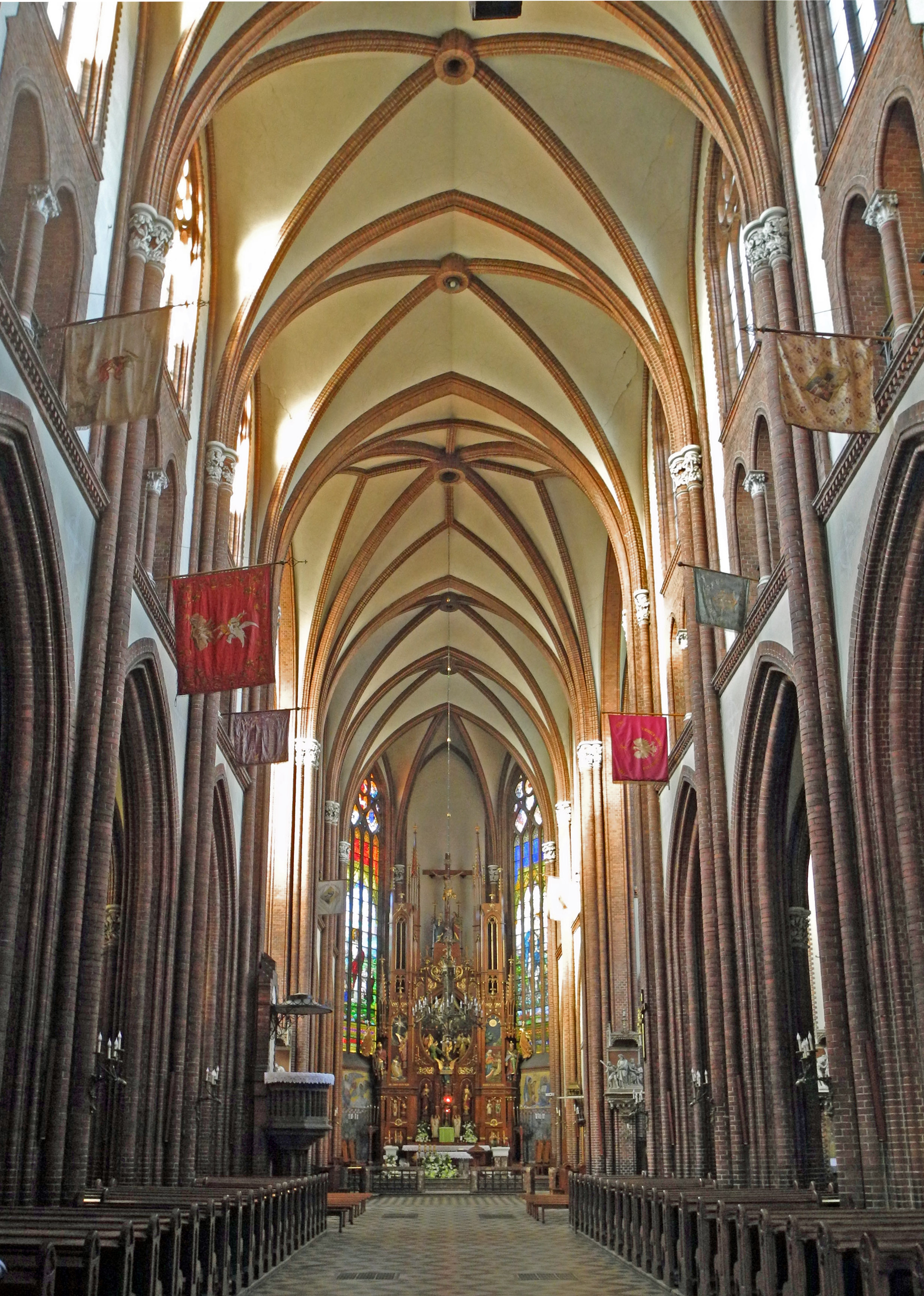 Innenraum der röm.-kath. Pfarrkirche Maria Trost in Żyrardów am Johann-Paul-II.-Platz, erbaut 1900–1903 nach einem Entwurf des Architekten Józef Pius Dziekoński (1844–1927)